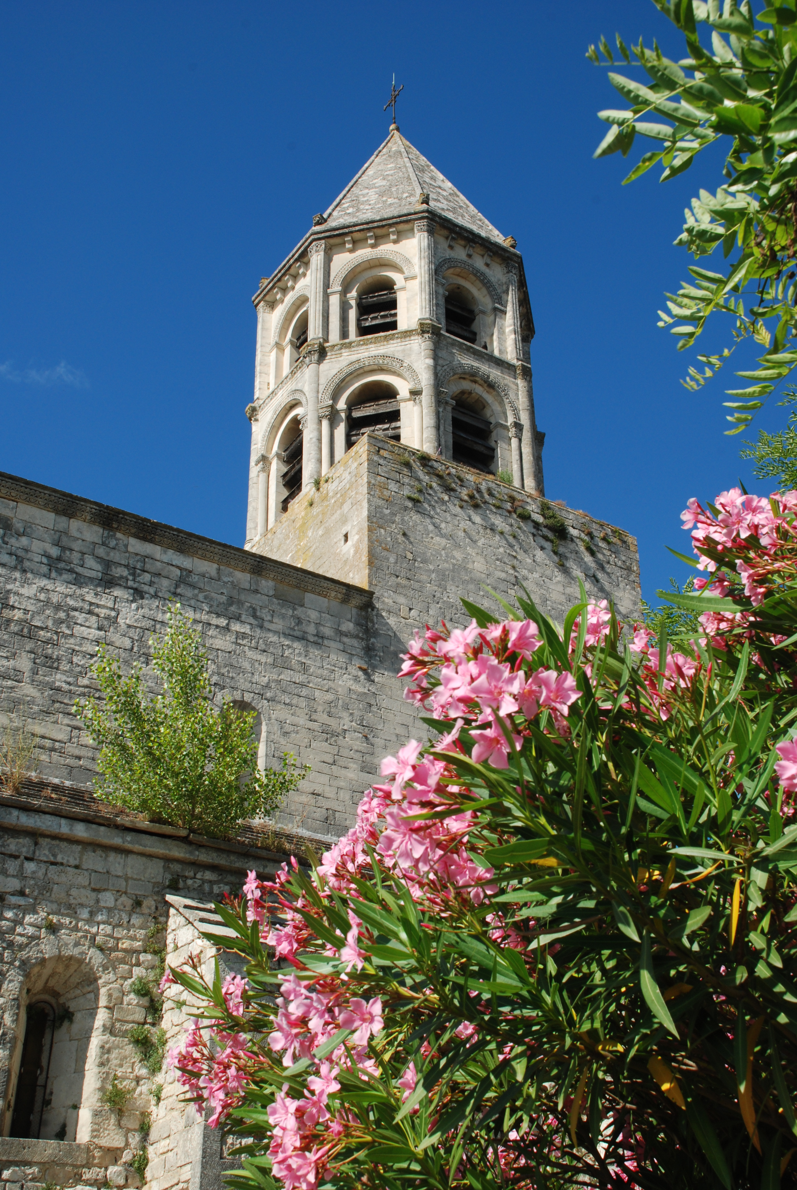 France - Drôme - La Garde-Adhémar